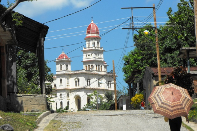 Vue de la Basilique de Notre-Dame de la Charité del Cobre depuis une rue du village d'El Cobre.